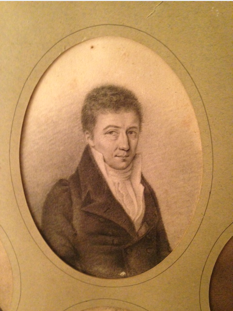 Le Comte Jean Bérenger (1767-1850), auteur du Décret impérial du 28 septembre 1807 sur la Cour des Comptes